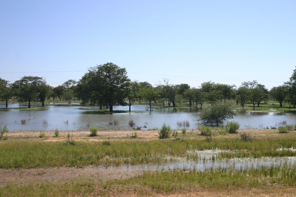 Ovamboland, Oshana, Efundia